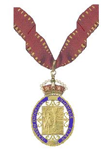 Eigen tekening Robert Prummel